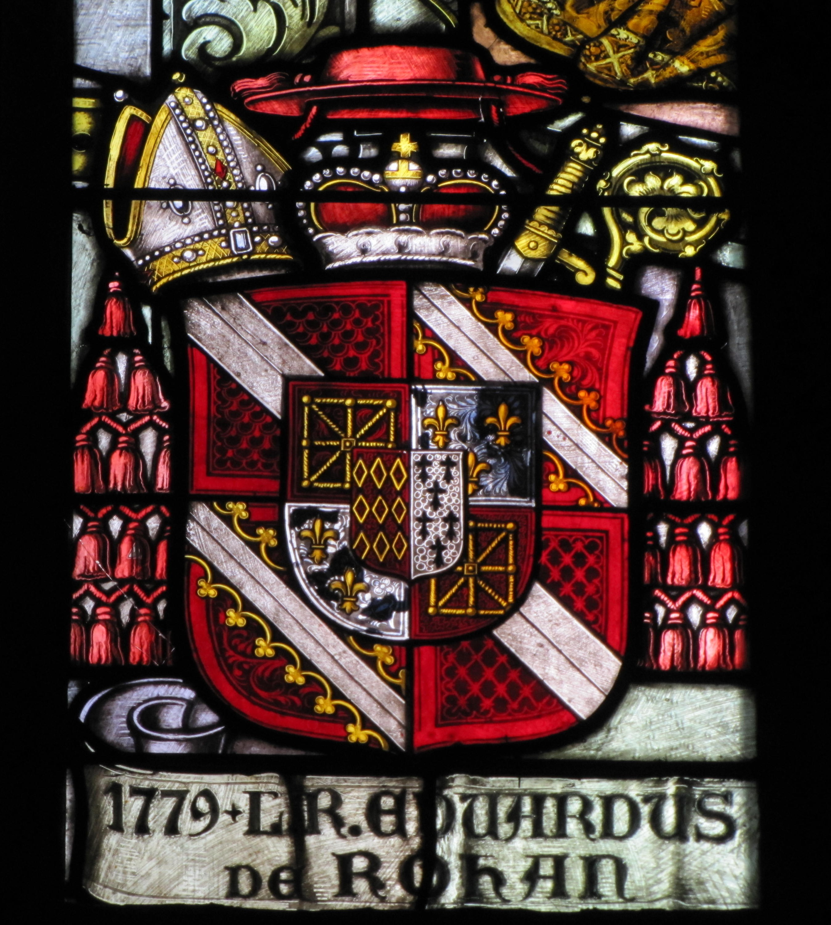 Alsace, Bas-Rhin, Saverne, Église Notre-Dame-de-la-Nativité (PA00084954, IA00055464). Verrière à personnages du chœur (Ott Frères, 1925): Blason de l'évêque de Strasbourg Louis René Edouard de Rohan Guéméné (1779-1801).